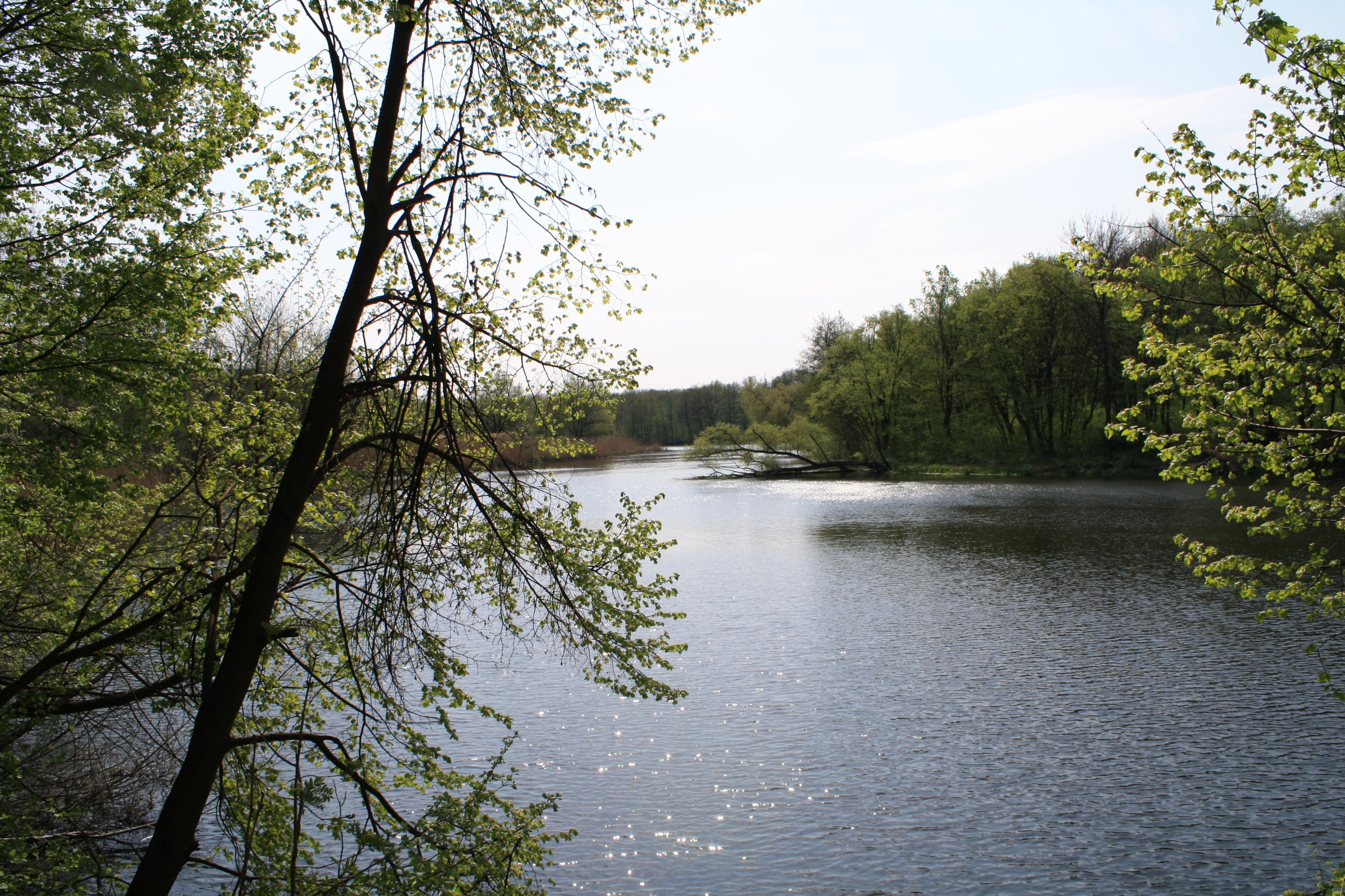 Донец. Май.